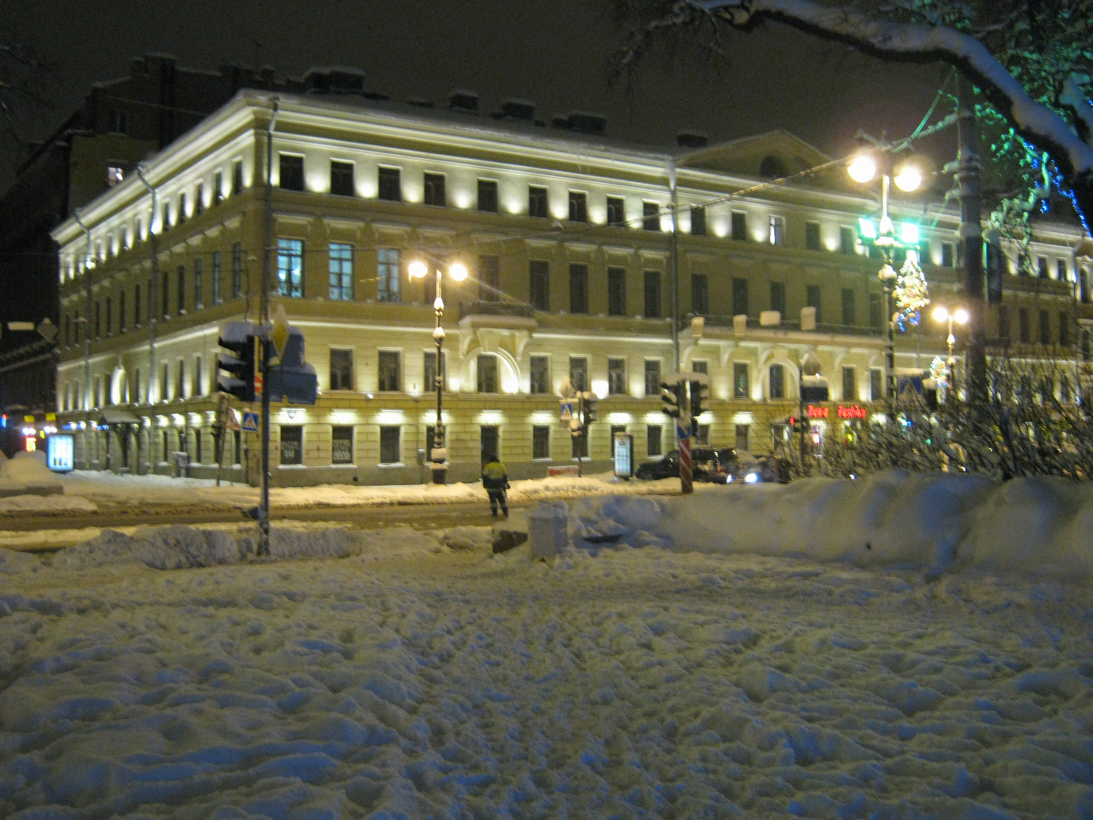 Дом № 8 по Адмиралтейский проспекту в Санкт Петербурге